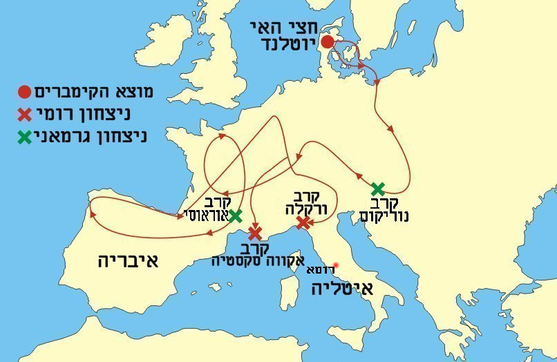 נדודי הקימברים והטווטונים והקרבות העיקרים במלחמת הקימברים